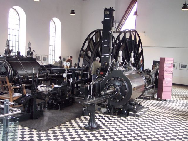 Ventilgesteuerte Dampfmaschine im LWL-Industriemuseum Zeche Nachtigall, Witten-Bommern; Fördermaschine der Zeche Prosper Schacht 1, Leistung: 400 PS